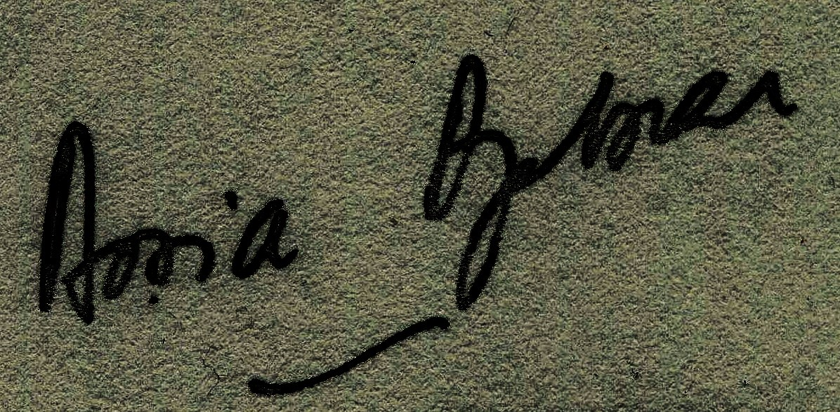 Signature de l'écrivain algréien Assia Djebar, membre de l'Académie française. Scan d'après catalogue dédicacé.